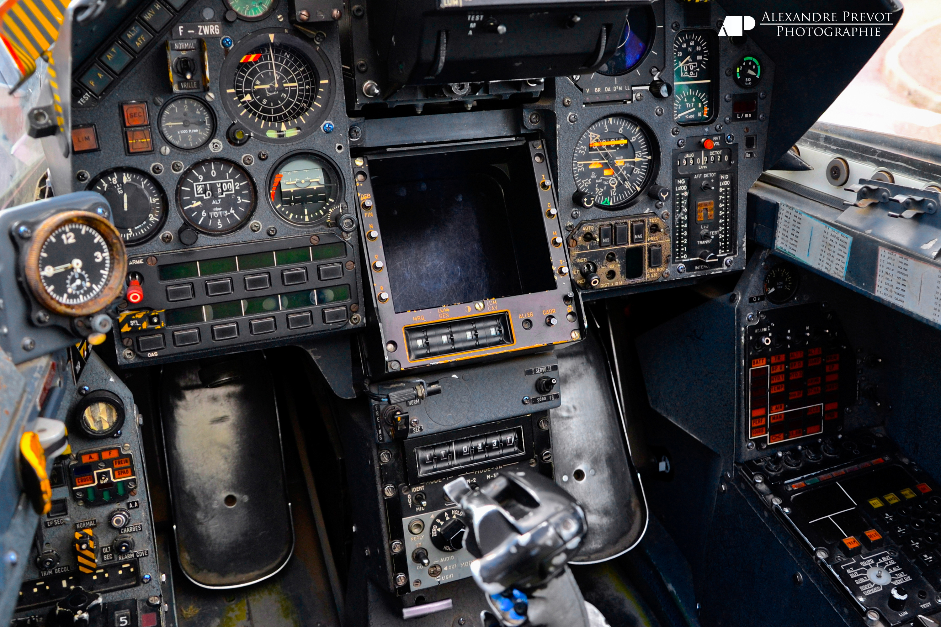 Cockpit Dassault Mirage 2000